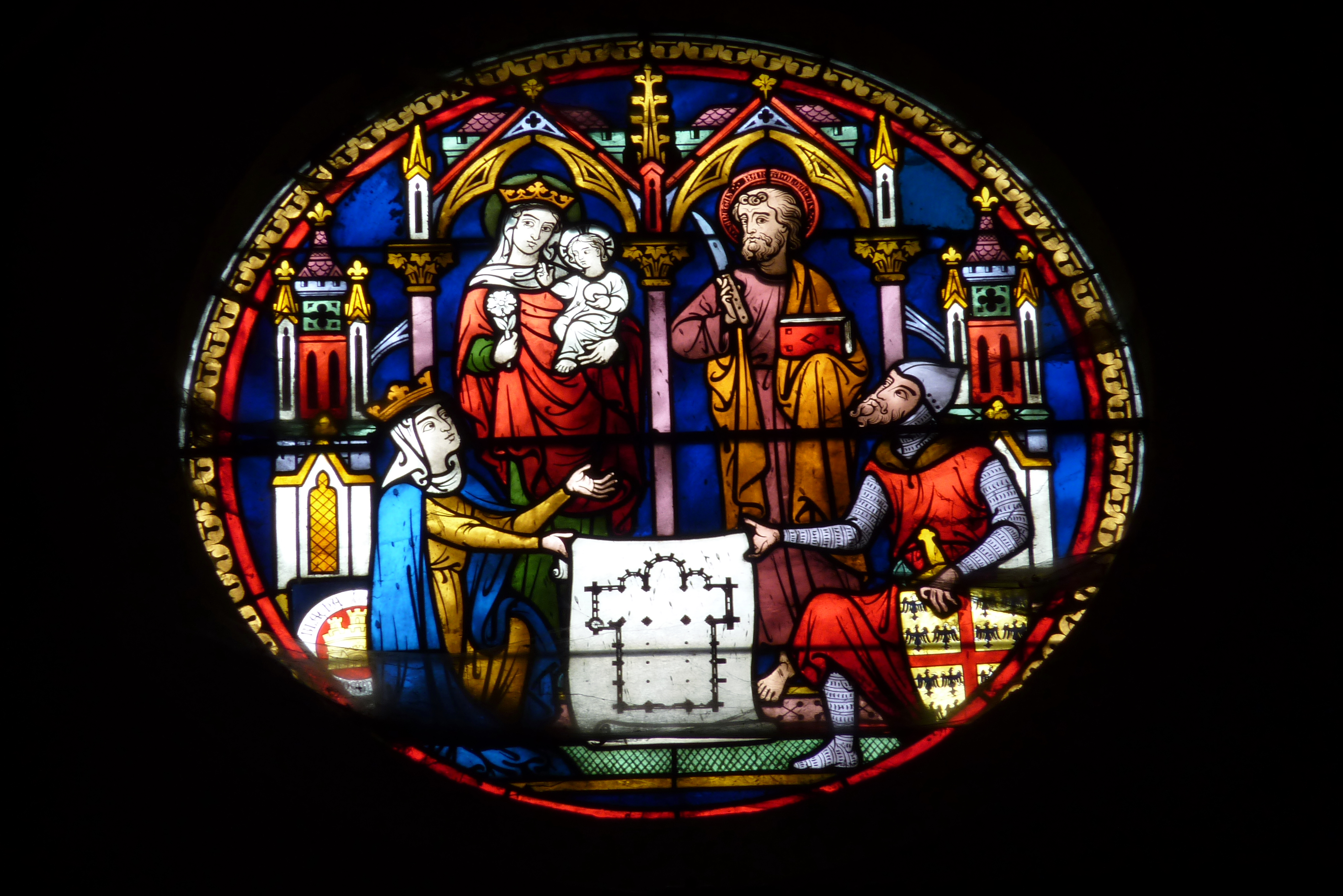 Bleiglasfenster in der katholischen Kirche Notre-Dame in Taverny, einer Gemeinde im Département Val-d'Oise (Île-de-France), Okulus über dem Portal Saint-Barthélemy im südlichen Seitenschiff; Darstellung: Blanka von Kastilien und der Konnetabel von Montmorency präsentieren Maria und dem Apostel Bartholomäus den Plan der Kirche von Taverny